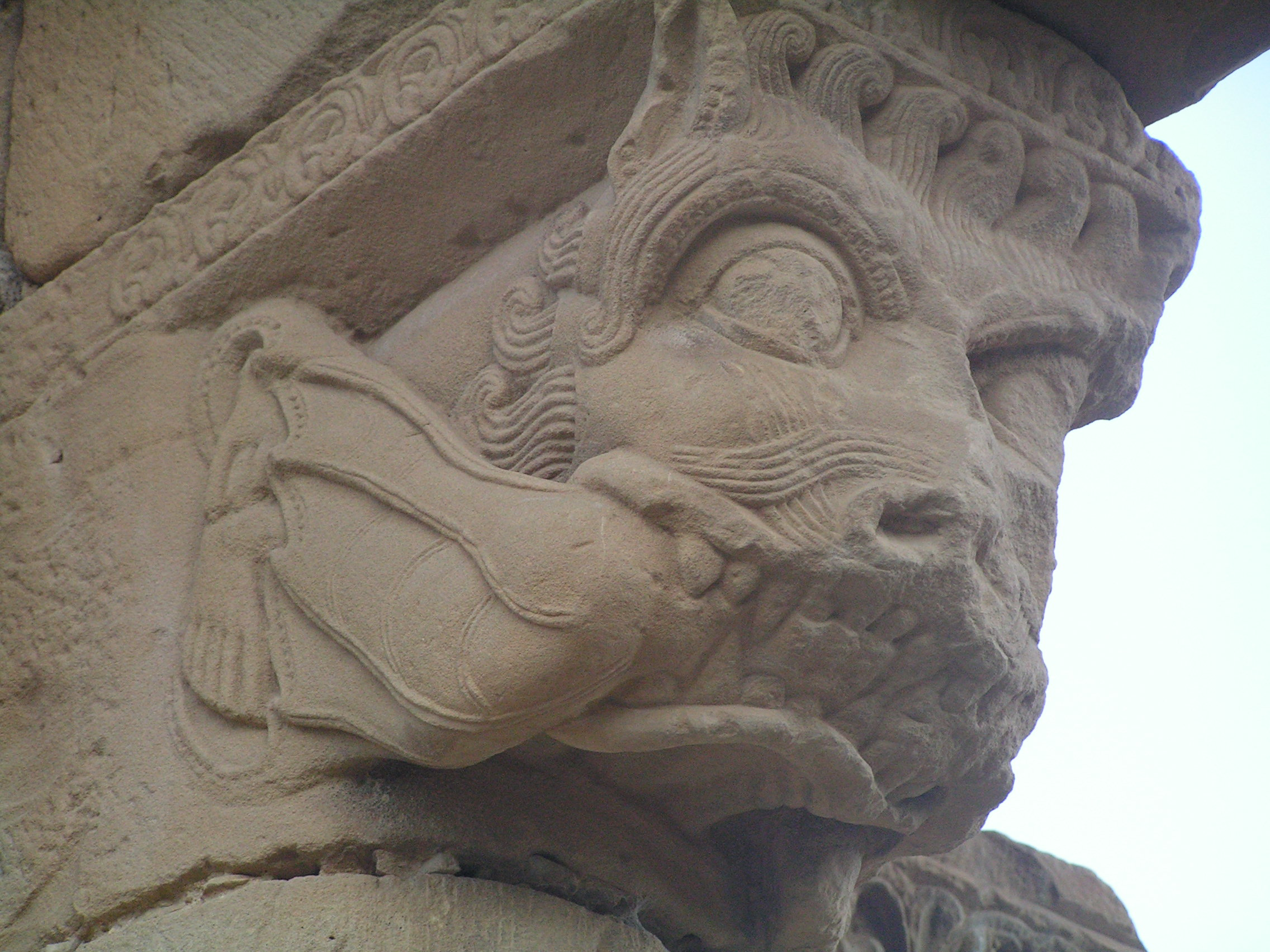 Aragonés: Modillón d'a ilesia romanica de San Lorién d'Uncastiello (Zinco Billas, Aragón), obra d'o taller d'o clamato mayestro d'Agüero (u mayestro de San Chuan d'a Peña).